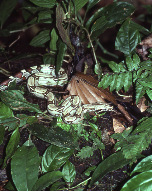 Boa constrictor, Panguana, Río Llullapichis, Dpto. Huánuco, Peru.